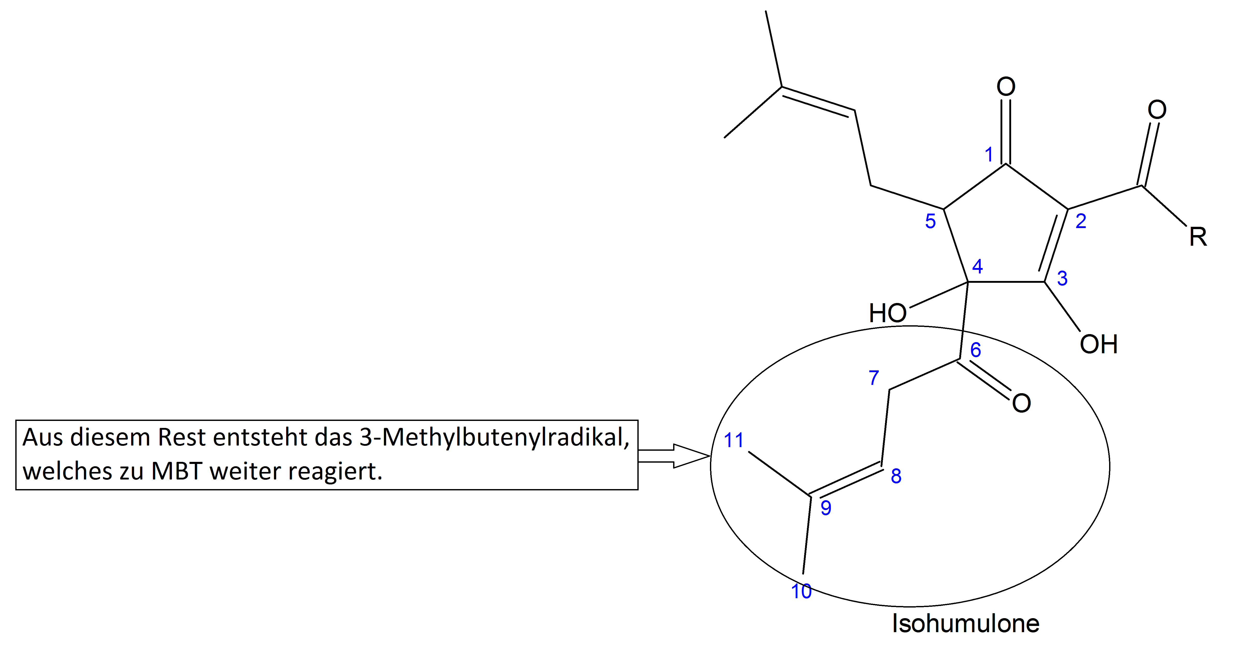 Strukturformel des Isohumulons